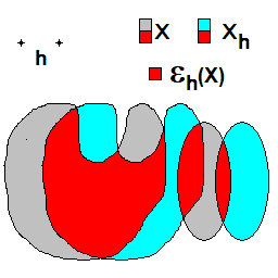 Illustration de l'érosion par un bipoint h obtenue par translation et intersection